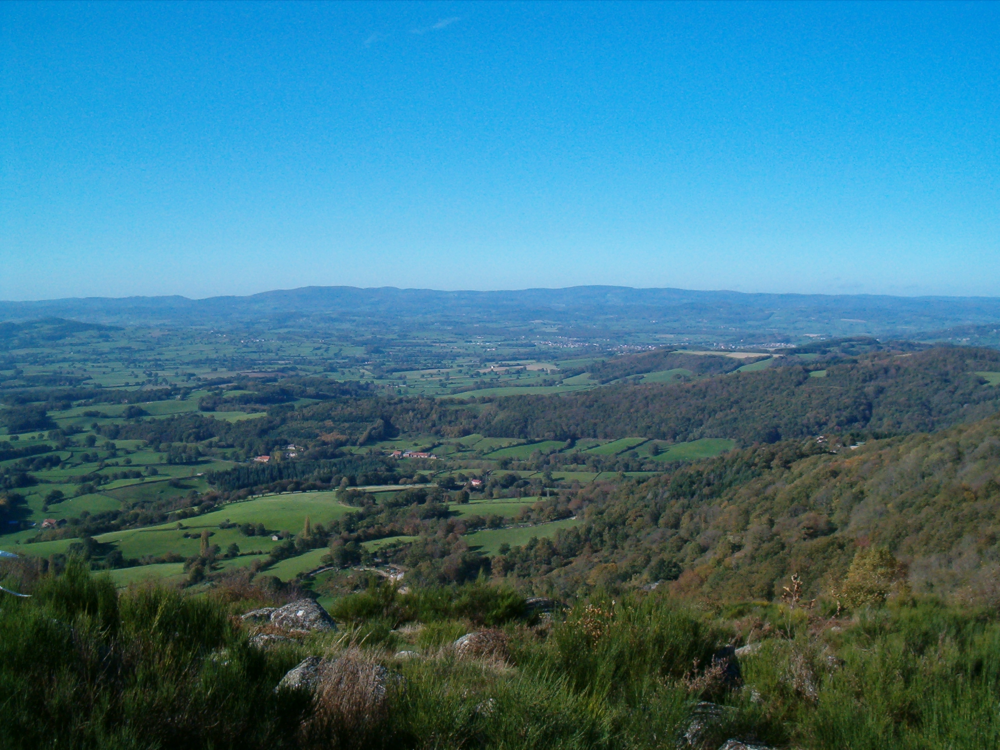 Panorame sur le Morvan depuis le belvédère du Carnaval à Uchon en Saône-et-Loire (France)